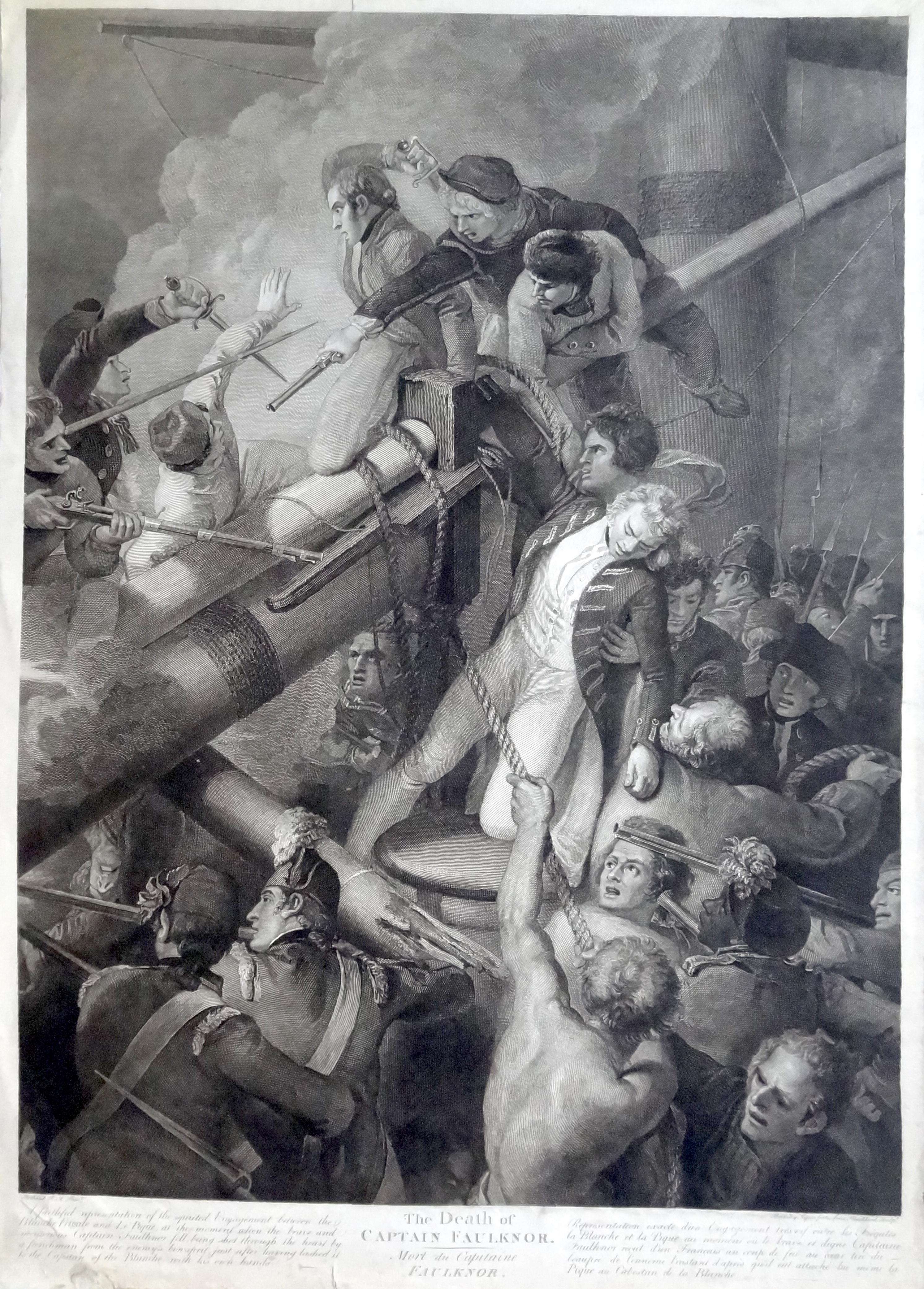 Mort au combat du capitaine Robert Faulknor le jeune le 5 janvier 1795 lors de l'engagement de la Frégate la Blanche contre la frégate la Pique - Guadeloupe